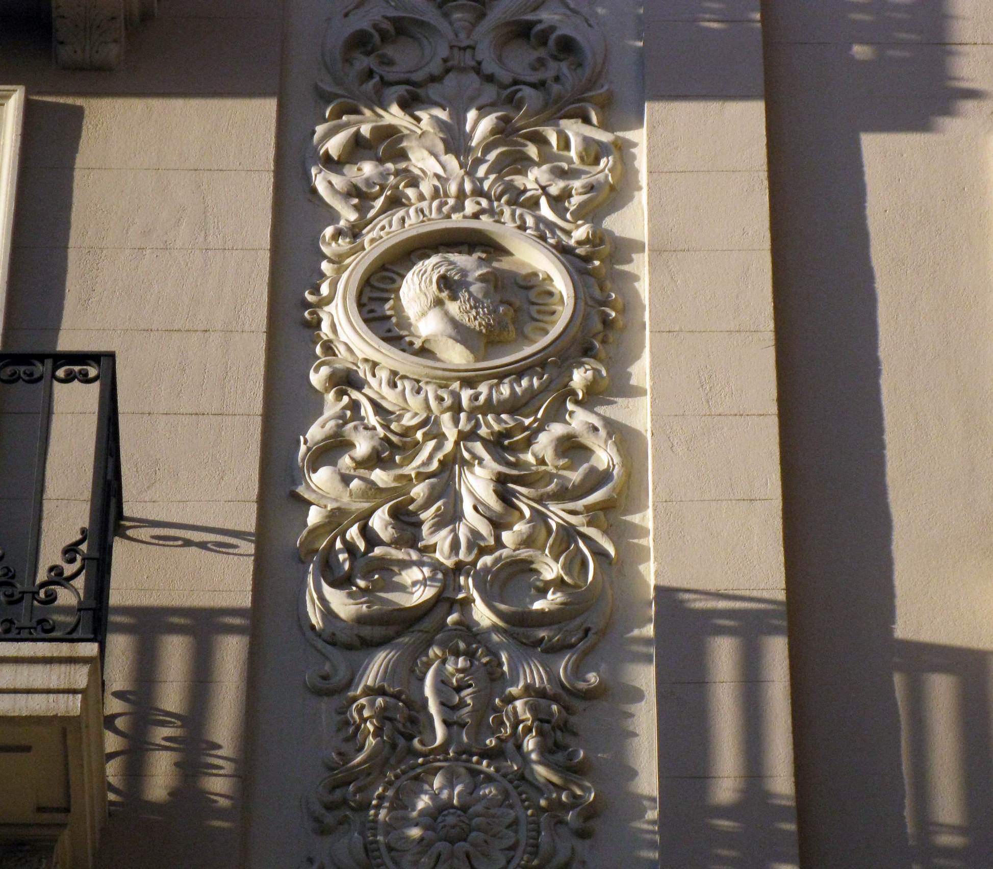 El medallons de La Vanguardia. C. de Tallers, 62 (Barcelona). Medalló amb la figura de Bartomeu Godó.